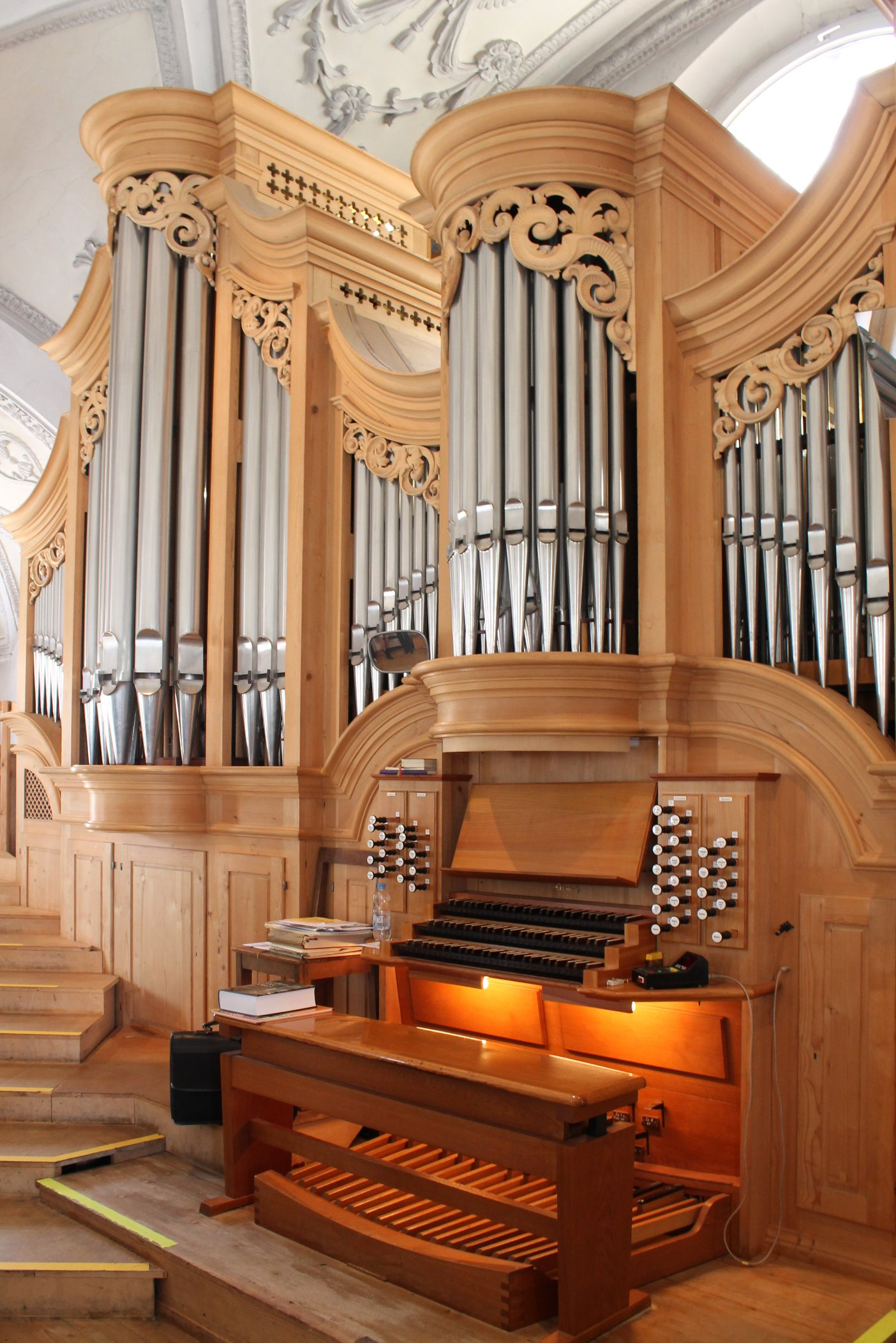 Orgel von St. Andreas in Wolfratshausen (1985, Eisenbarth, III/35)